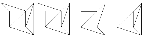 צעדים 2 ו3